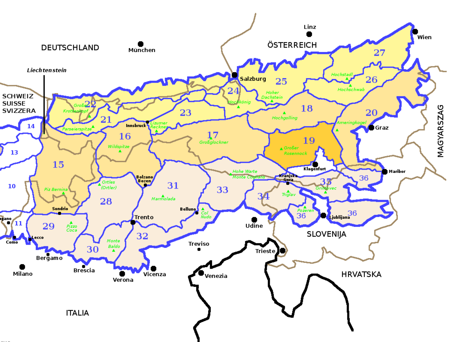 Alpi Orientali secondo la SOIUSA con evidenziate le Alpi Noriche